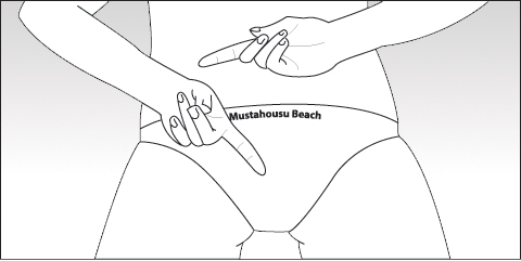 Visar parreblock mot båda motståndarna